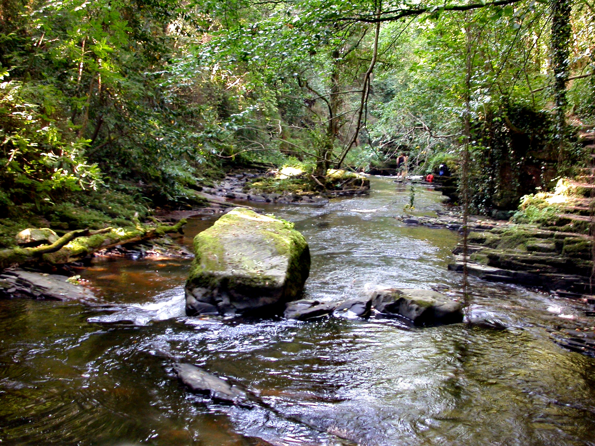 Gleannta an Chlair, Co. Thiobraid Arann.